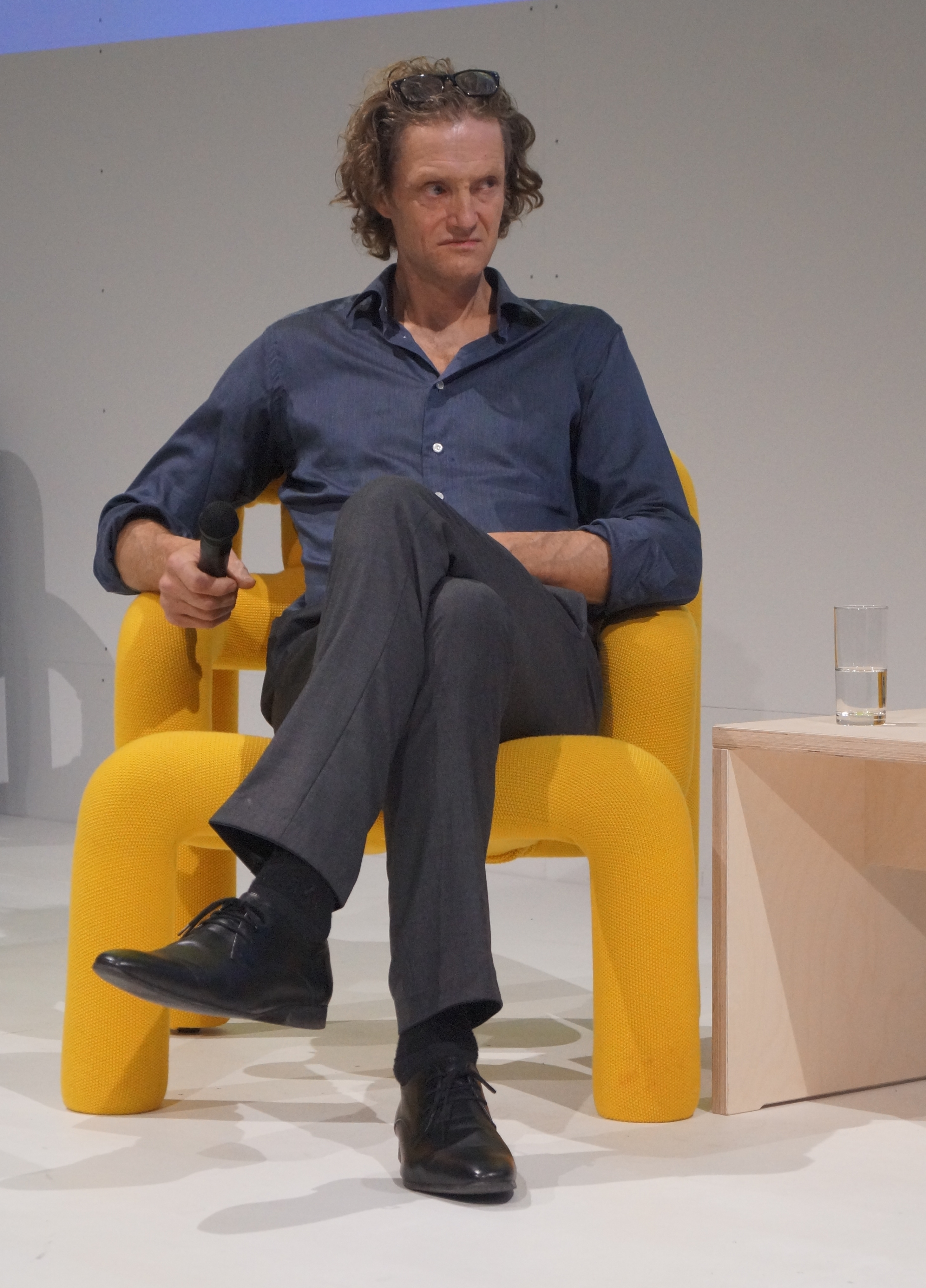 Frankfurter Buchmesse 2019 Personality rights warningAlthough this work is freely licensed or in the public domain, the person(s) shown may have rights that legally restrict certain re-uses unless those depicted consent to such uses. In these cases, a model release or other evidence of consent could protect you from infringement claims.